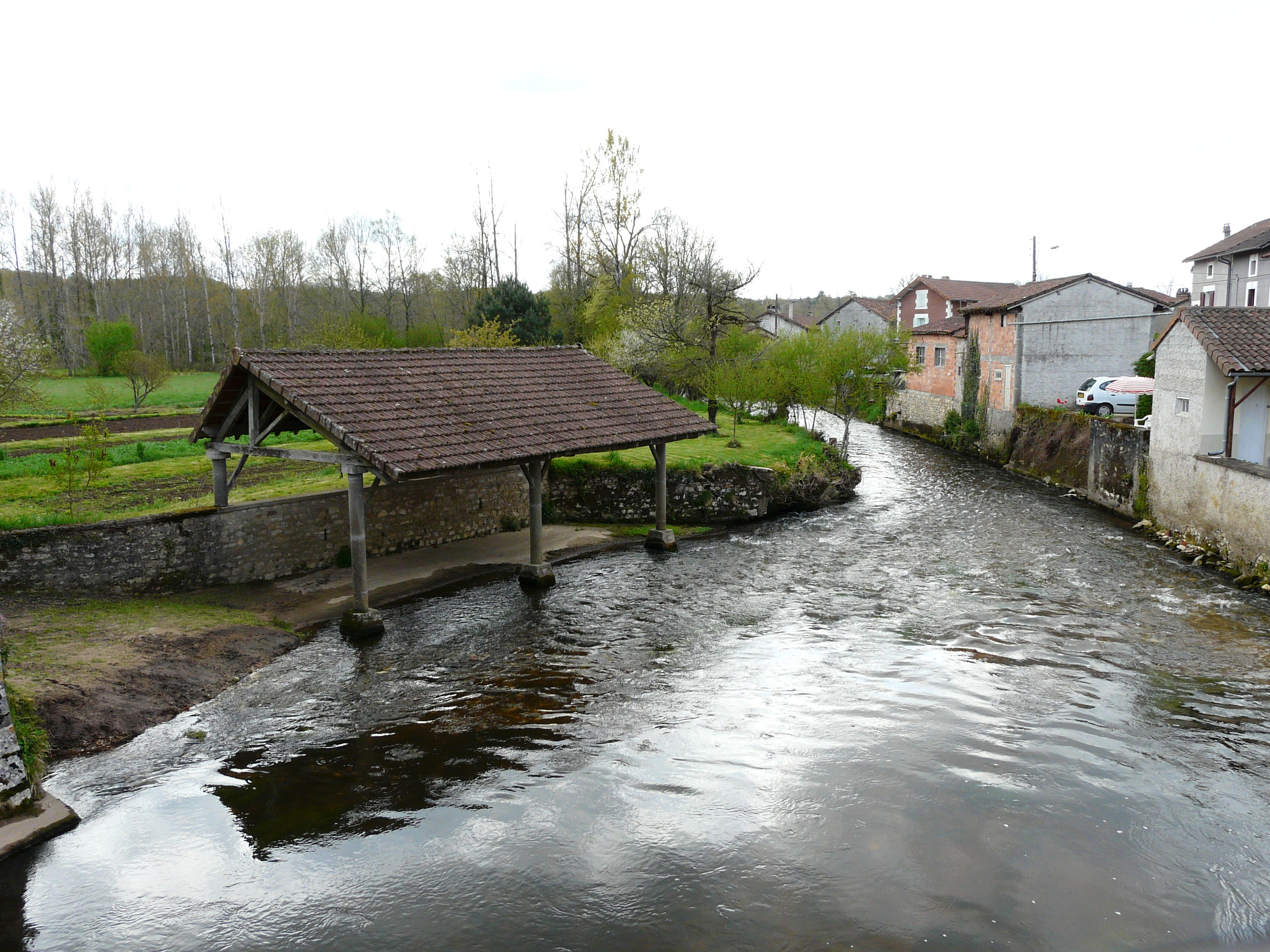 La Dronne en aval du pont de la Varenne, Saint-Front-la-Rivière, Dordogne, France